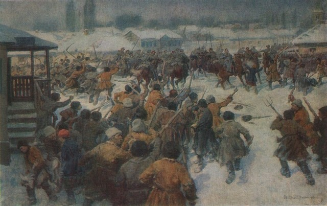 Картины художника Ивана Владимирова (1870-1947)